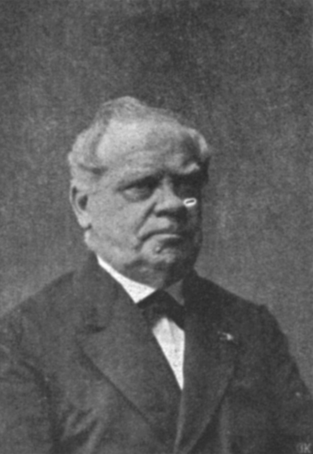 Photograph of Hermann Wasserschleben (1812–1893)